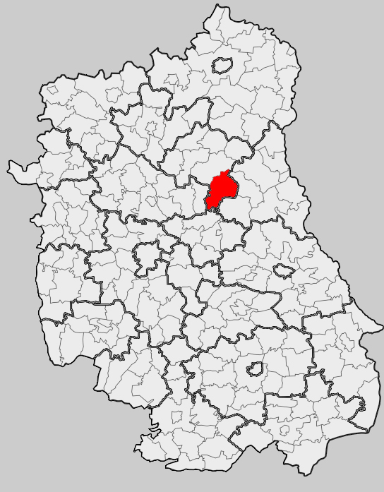 Map of gmina Sosnowica, Parczew county, Lublin voivodship Mapa gminy Sosnowica, powiat parczewski, województwo lubelskie